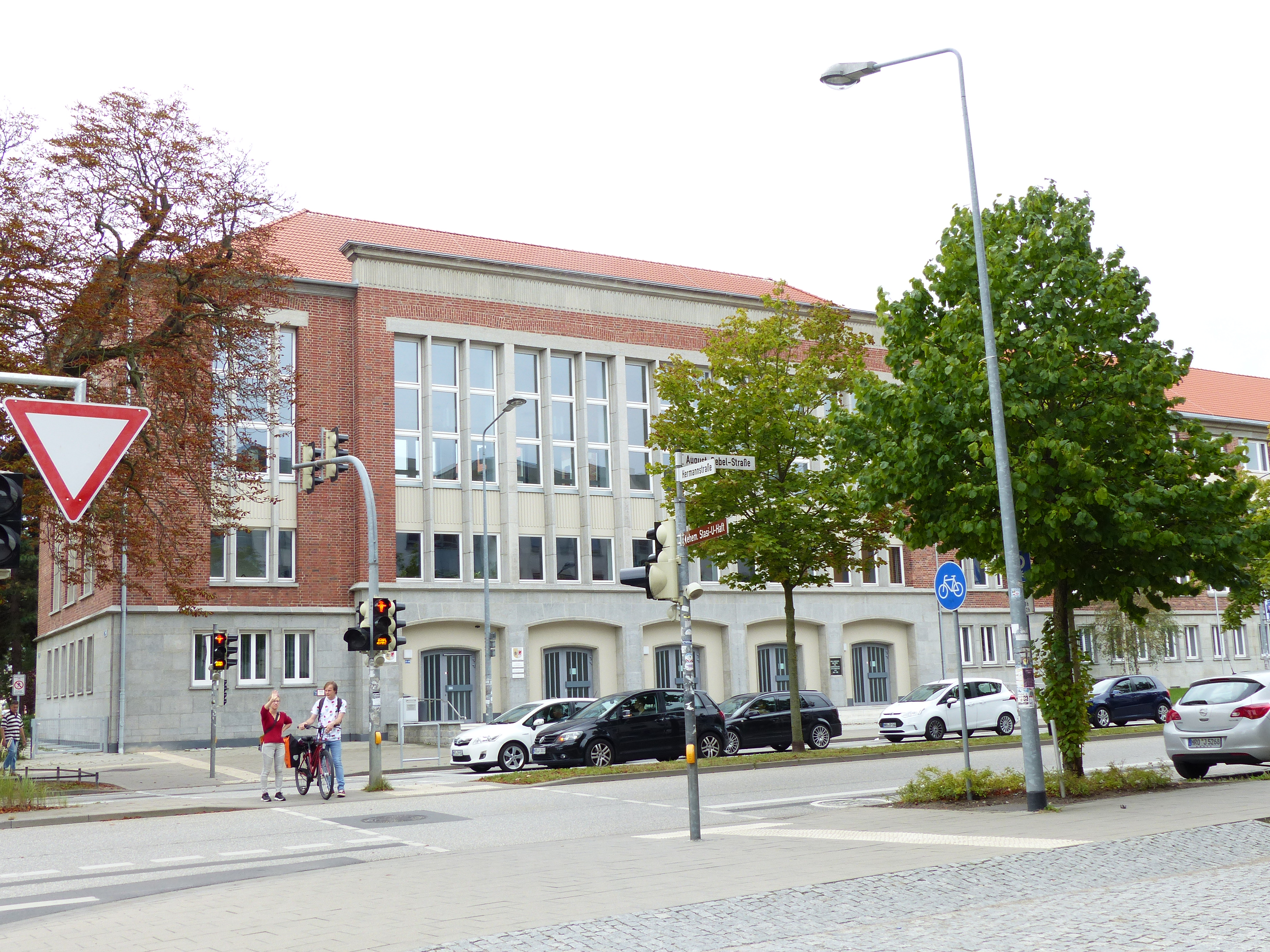 Gebäude des Landesarbeitsgerichts Mecklenburg-Vorpommern, Landgerichts Rostock, Arbeitsgerichts Rostock und des Sozialgerichts Rostock, Ecke August-Bebel-Straße / Hermannstraße